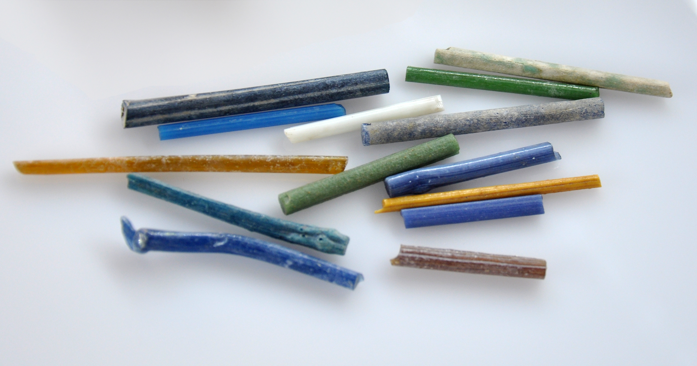 Baguettes de verre coloré, trouvées lors des fouilles de l'atelier d'un verrier, Egypte, XVIIIème Dynastie, 16ème - 14ème siècle - JC. Musées Royaux d'Art et d'Histoire, section des Arts Décoratifs, Parc du Cinquantenaire, Bruxelles.